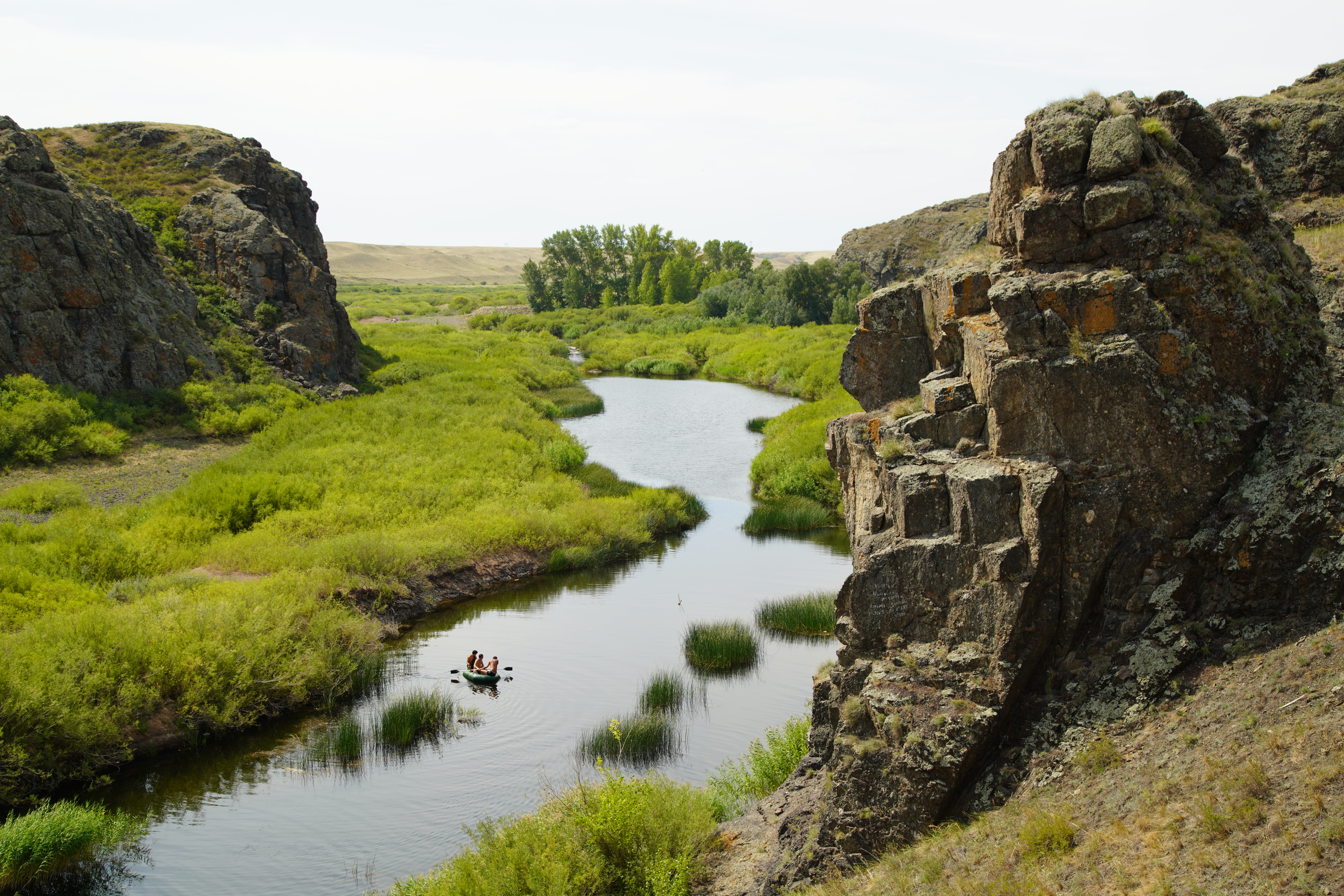 Река Силети, каньон Бестобе